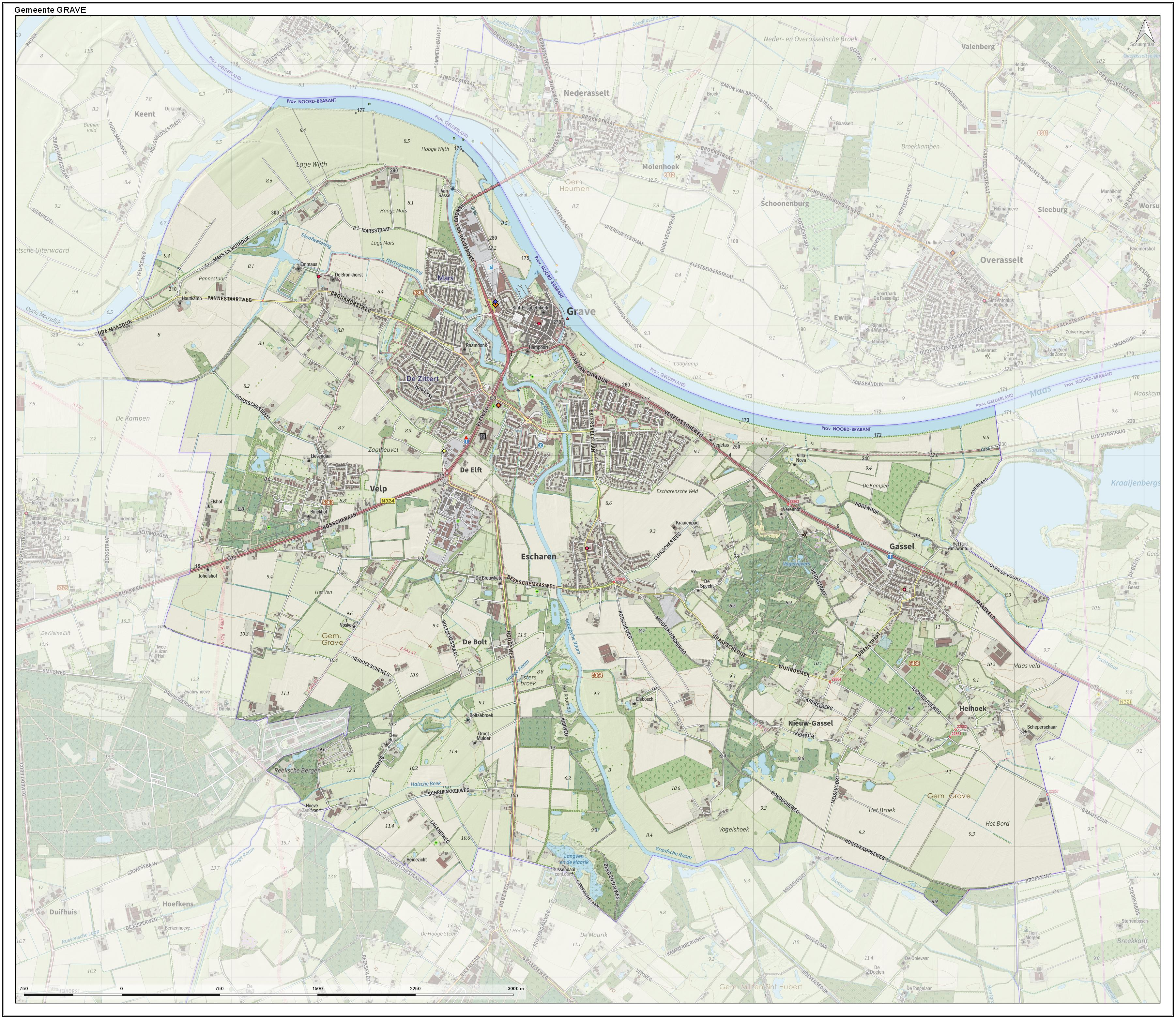 Topografische gemeentekaart. Resolutie: 400 pixels/km. Kaartbeeld samengesteld uit de open geodata van de Top10NL en Top25namen (Kadaster), Creative Commons-BY licentie. Gebouwvlakken uit open geodata BAG extract. Wegen uit de OpenStreetMap, OpenStreetMap community. Reliëfschaduw uit de Actuele Hoogtekaart AHN2. Samenstelling en kleurenschema: Jan-Willem van Aalst, met QGIS. Zie ook de Legenda.